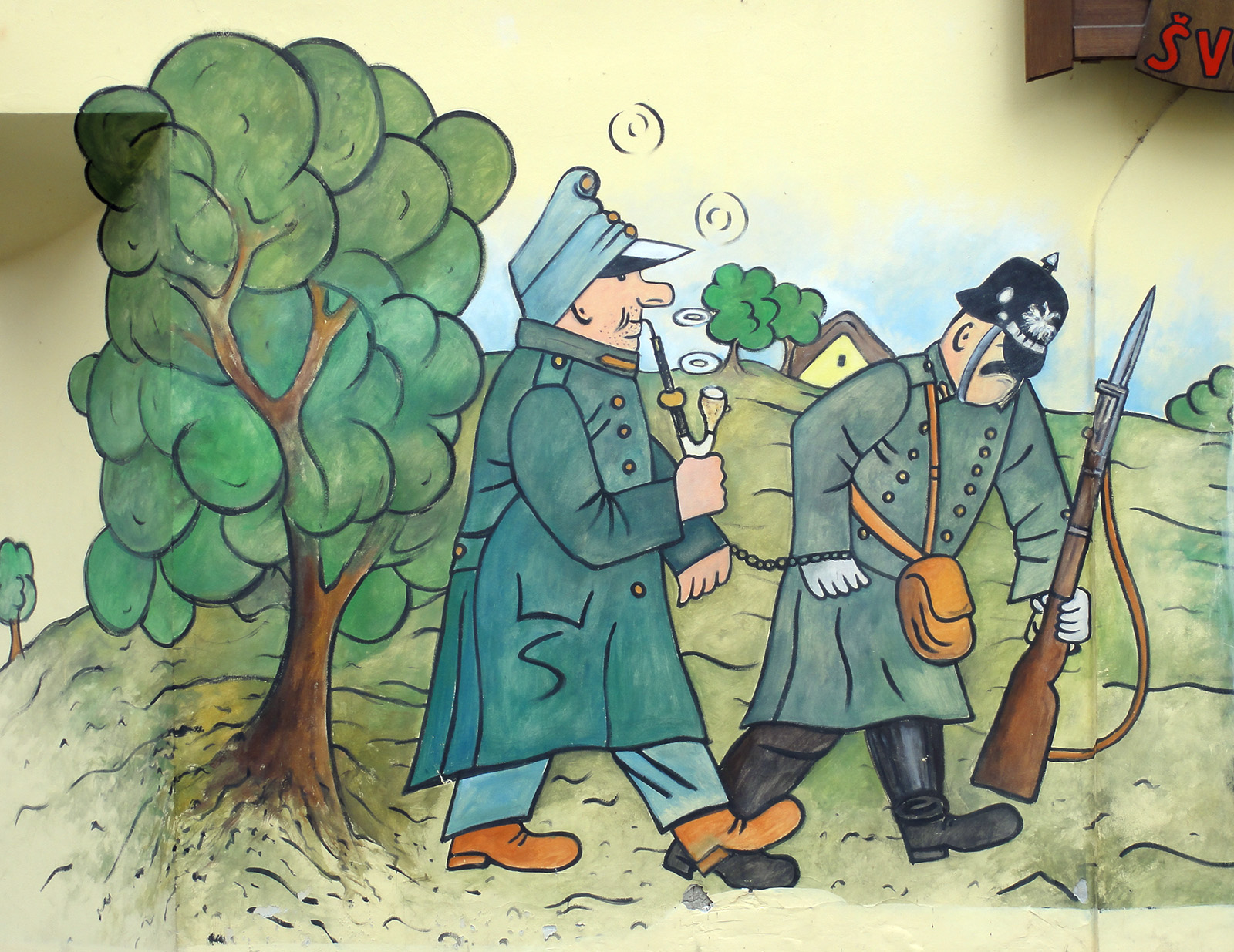 Mural